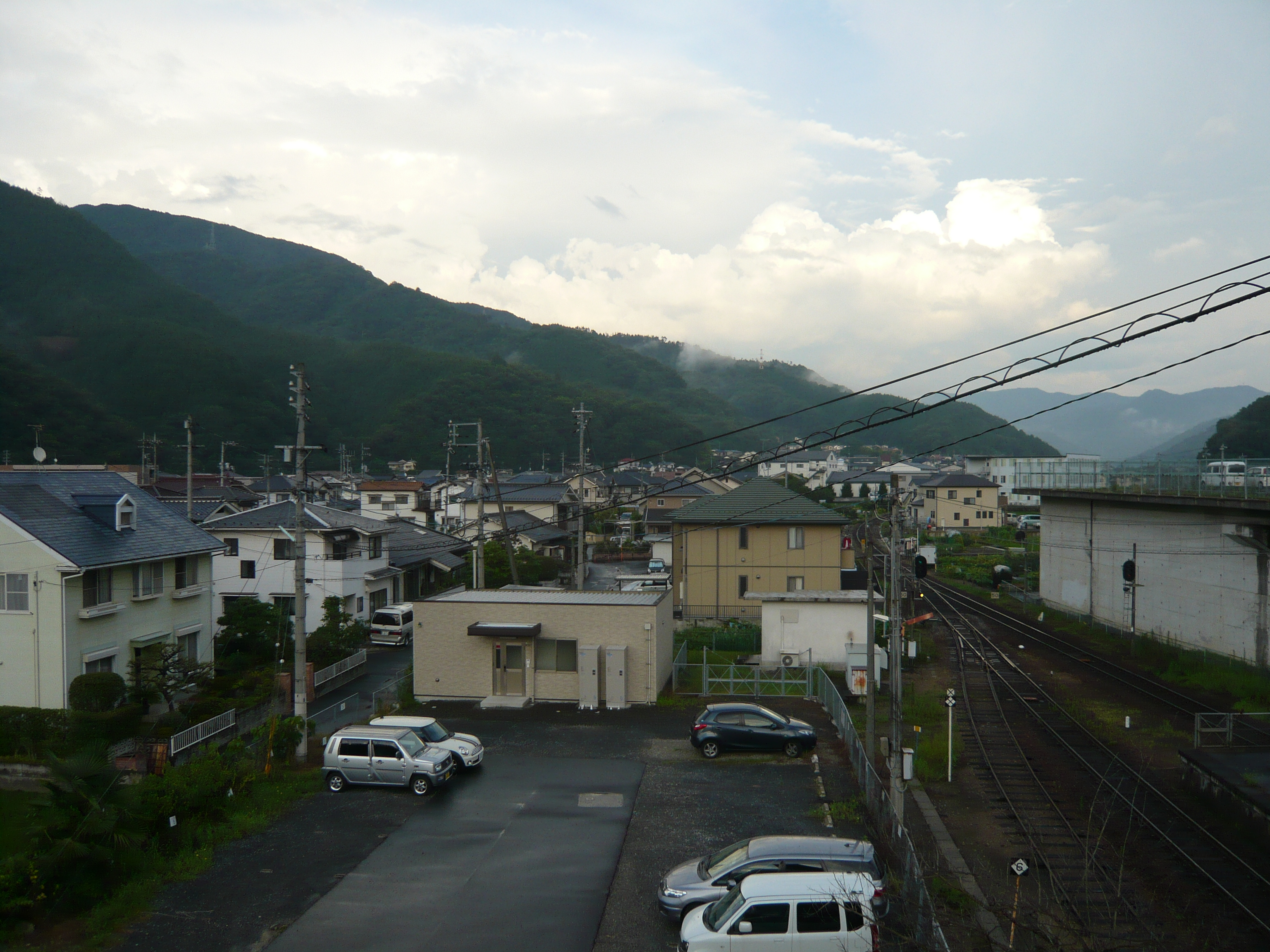 芸備線下深川駅前